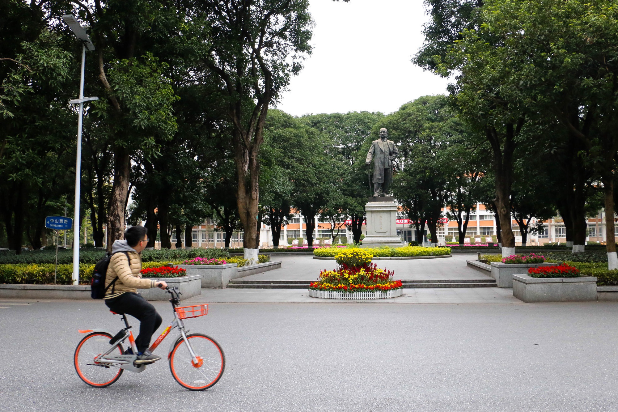 华南理工大学五山校区内的孙中山先生像